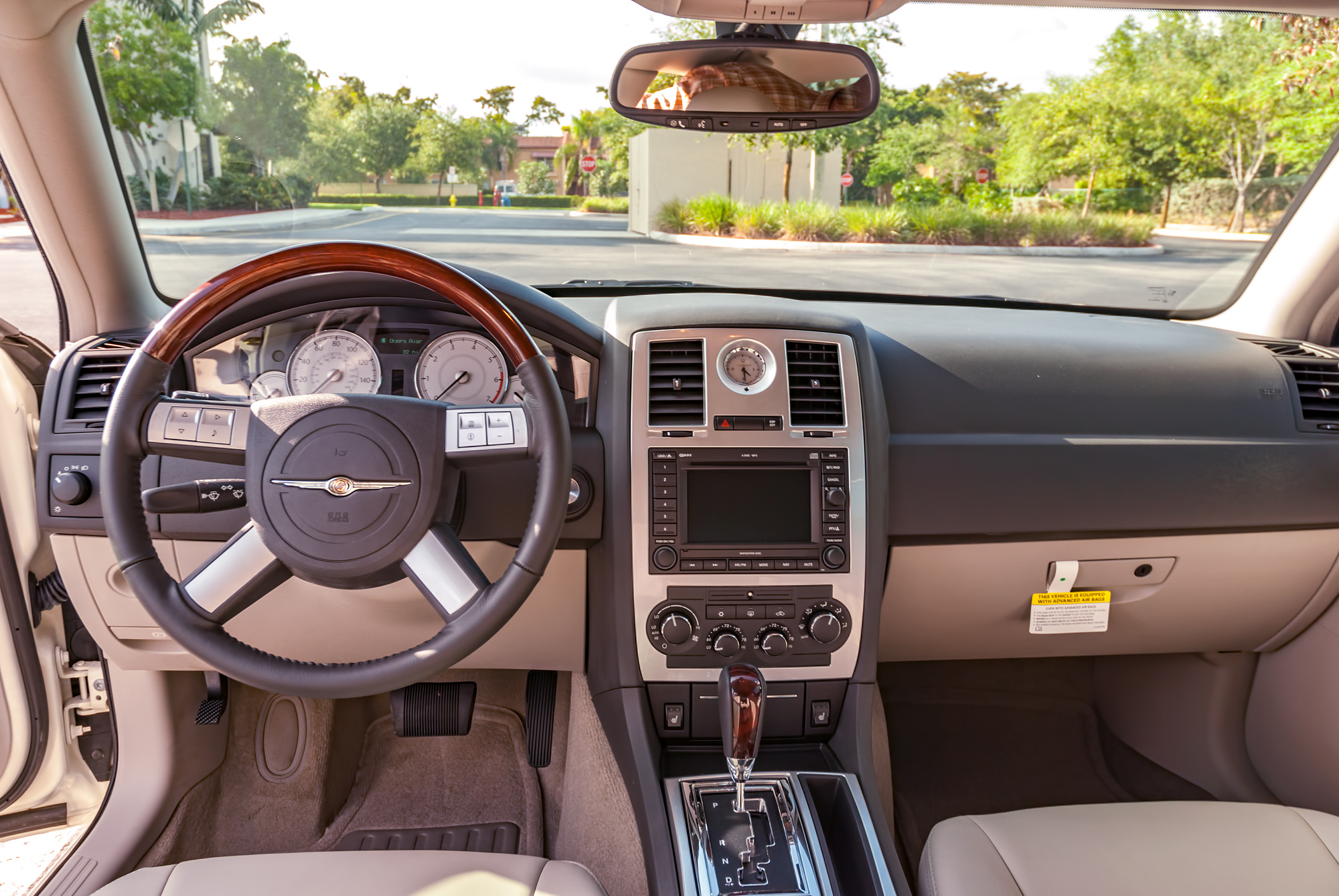 Chrysler 300c (5.7l) Innenansicht - US Modell